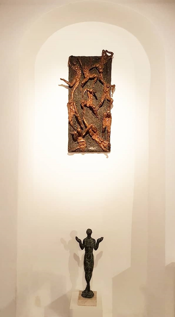 Detalj, izložba u Galeriji svetog Krševana, Šibenik, godina 2019